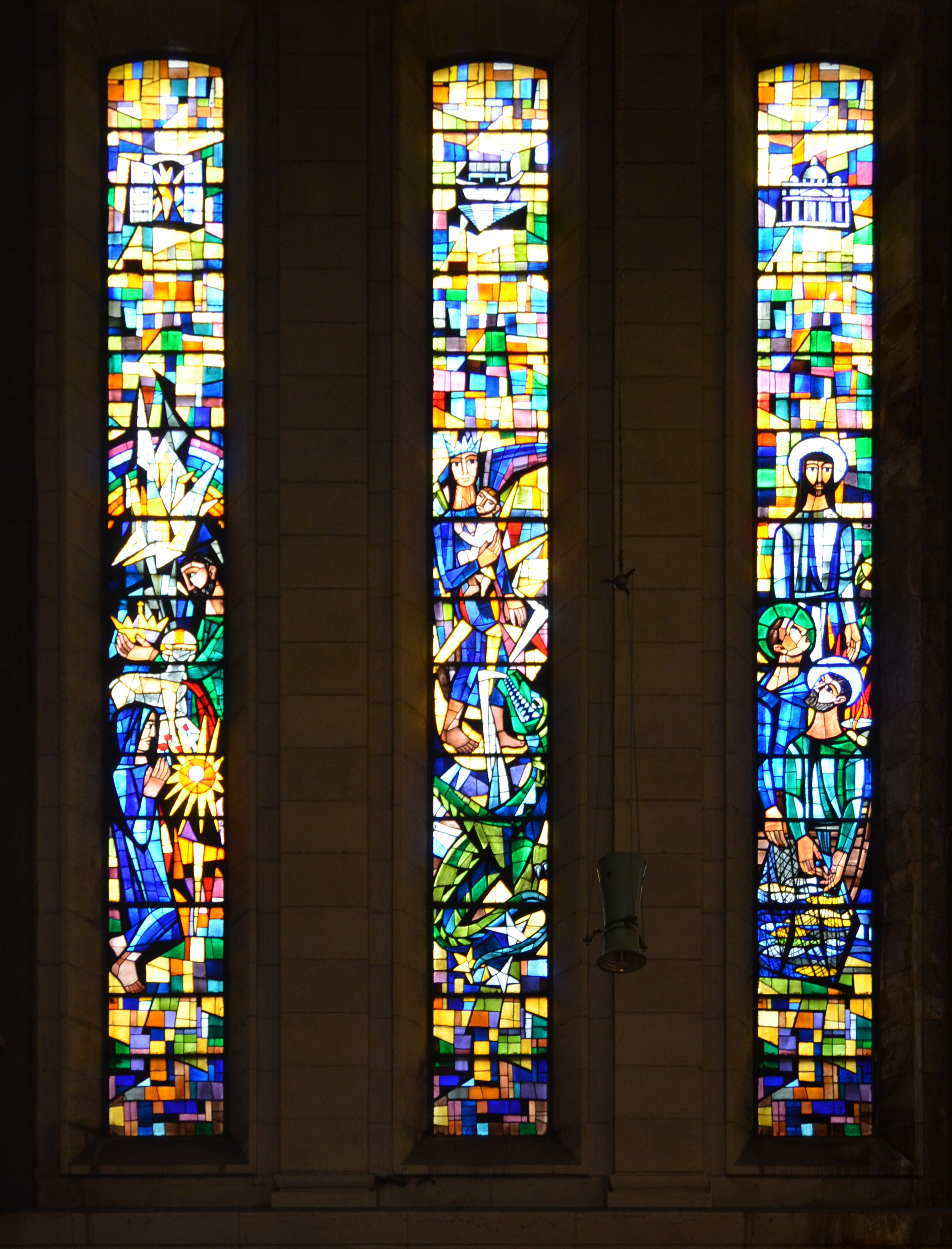 Charleroi (Belgique) - Église Saint-Christophe - Vitraux dans la nouvelle nef. Créés par Georges Boulmant et Zéphir Busine.